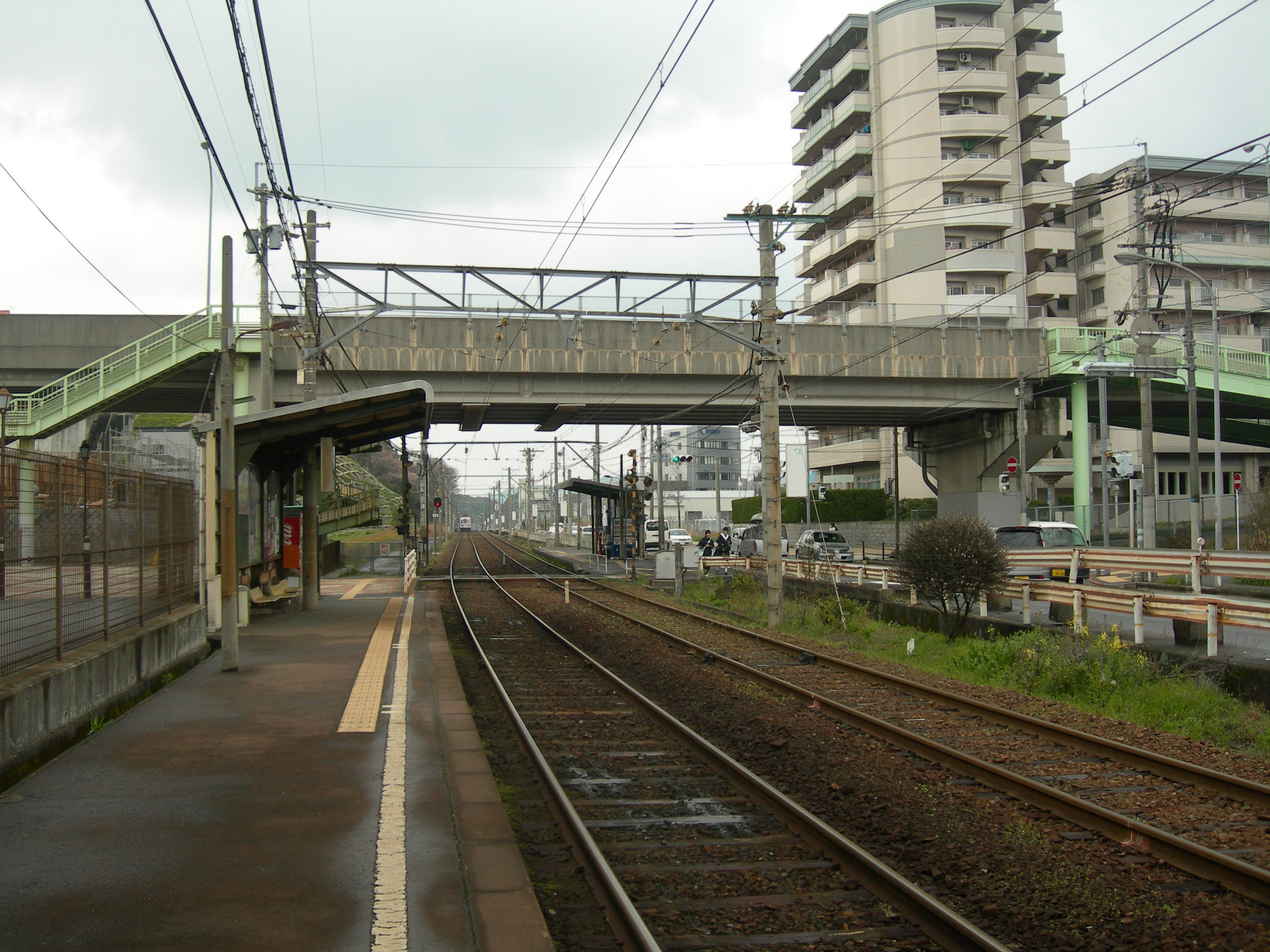 今池駅